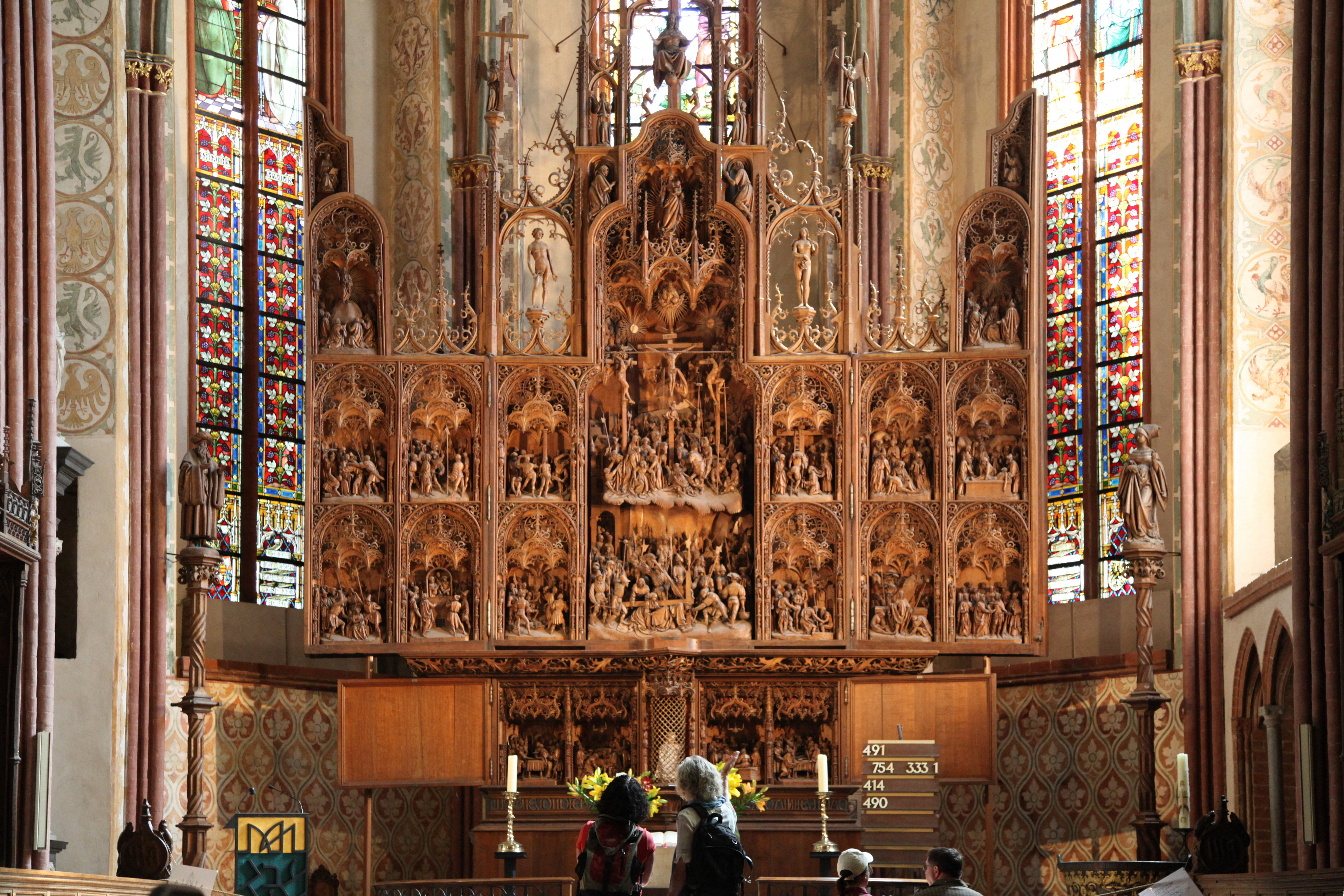 Bordesholmer Altar im Dom in Schleswig